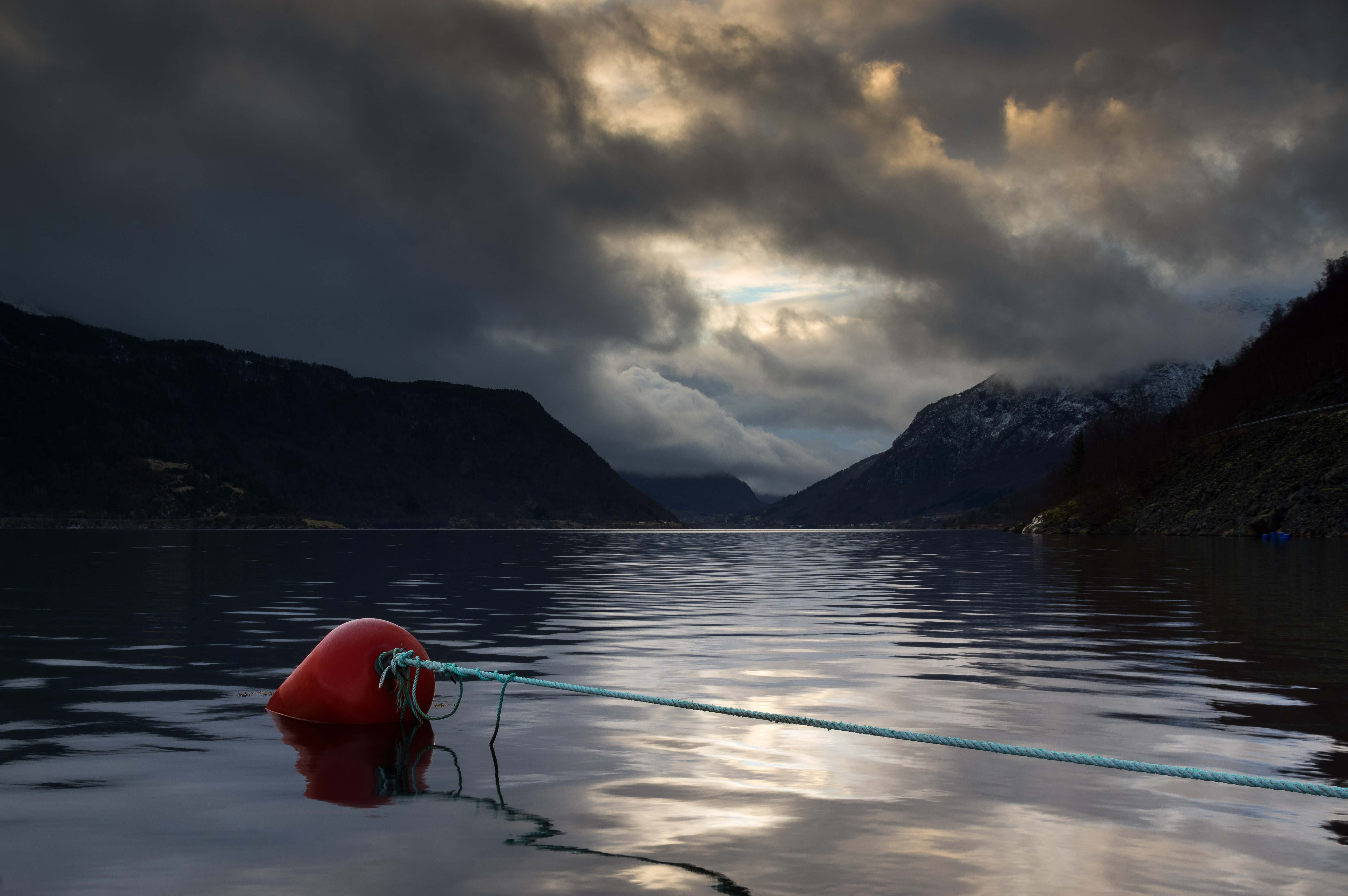 Sognefjorden sett frå Skjersnes i Sogndal.